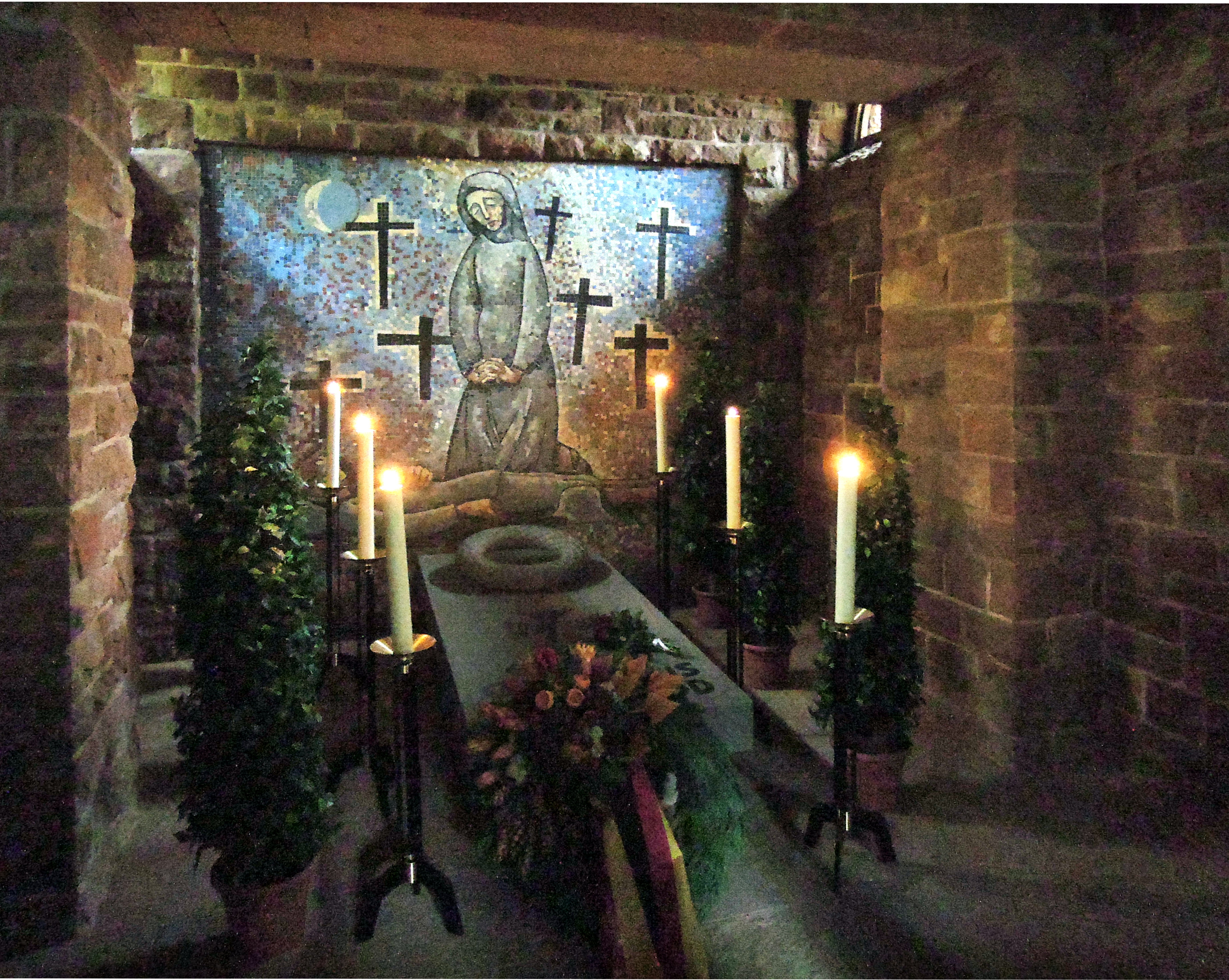 Volkstrauertag 2013 am Ehrenmal